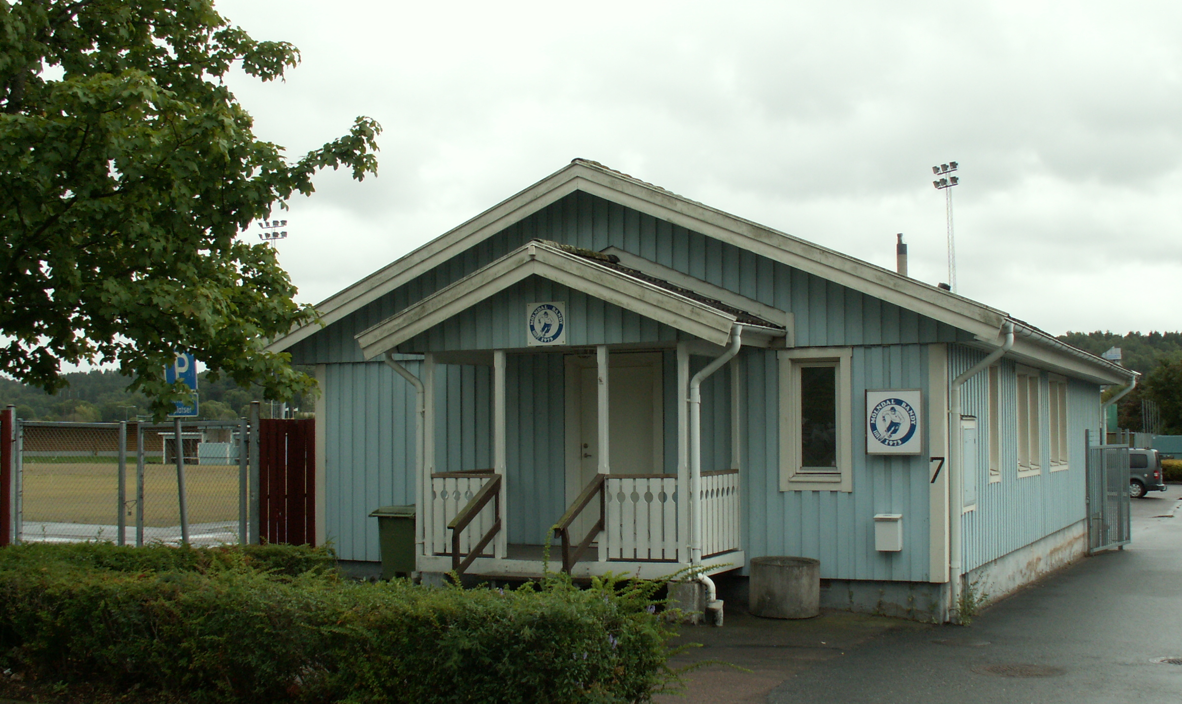 Mölndal Bandys klubbstuga i Åbyområdet. Till vänster skymtar den vid fototillfället (1 september) ännu inte spolade bandybanan.